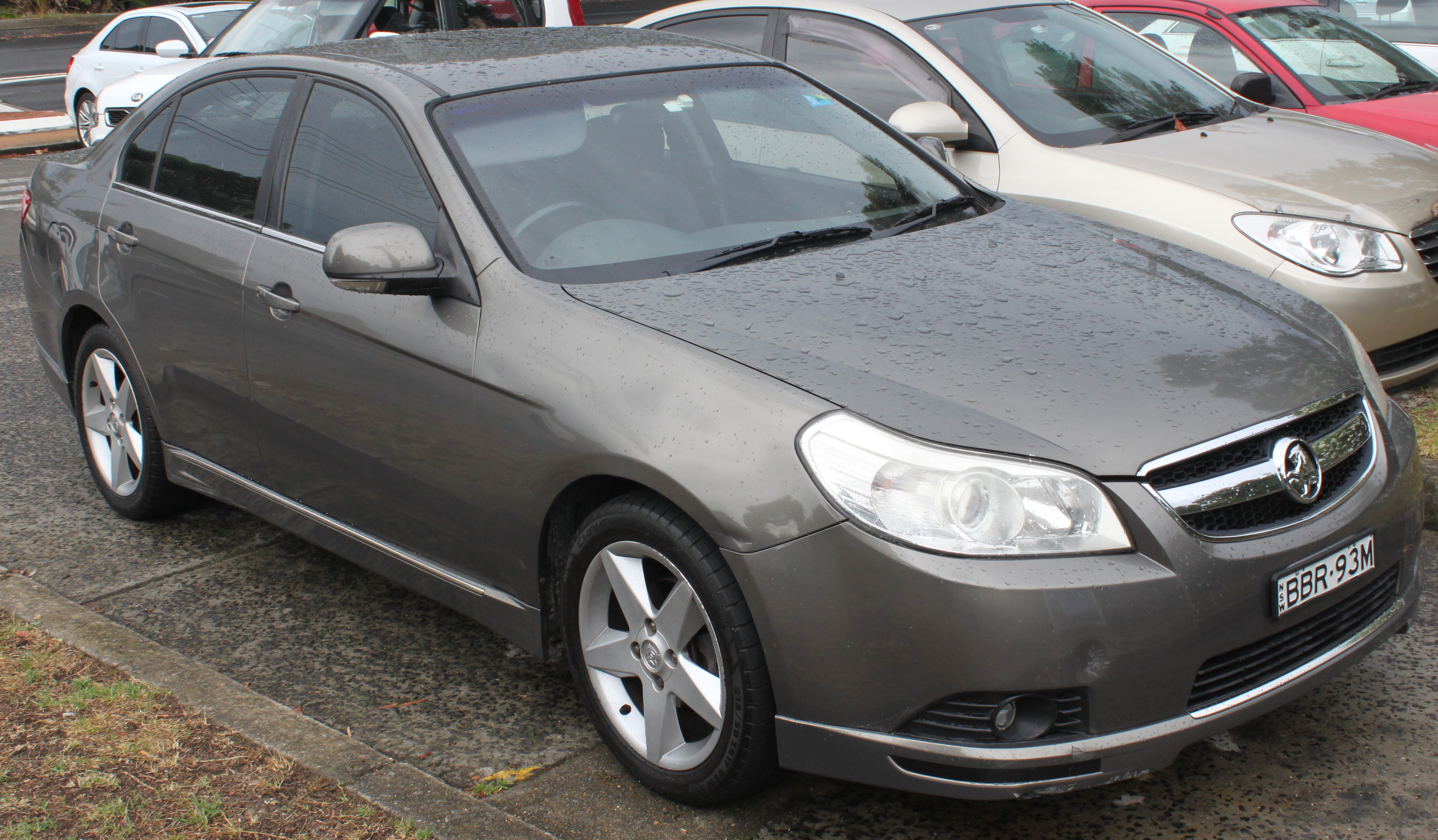 Holden Epica EP CDXi